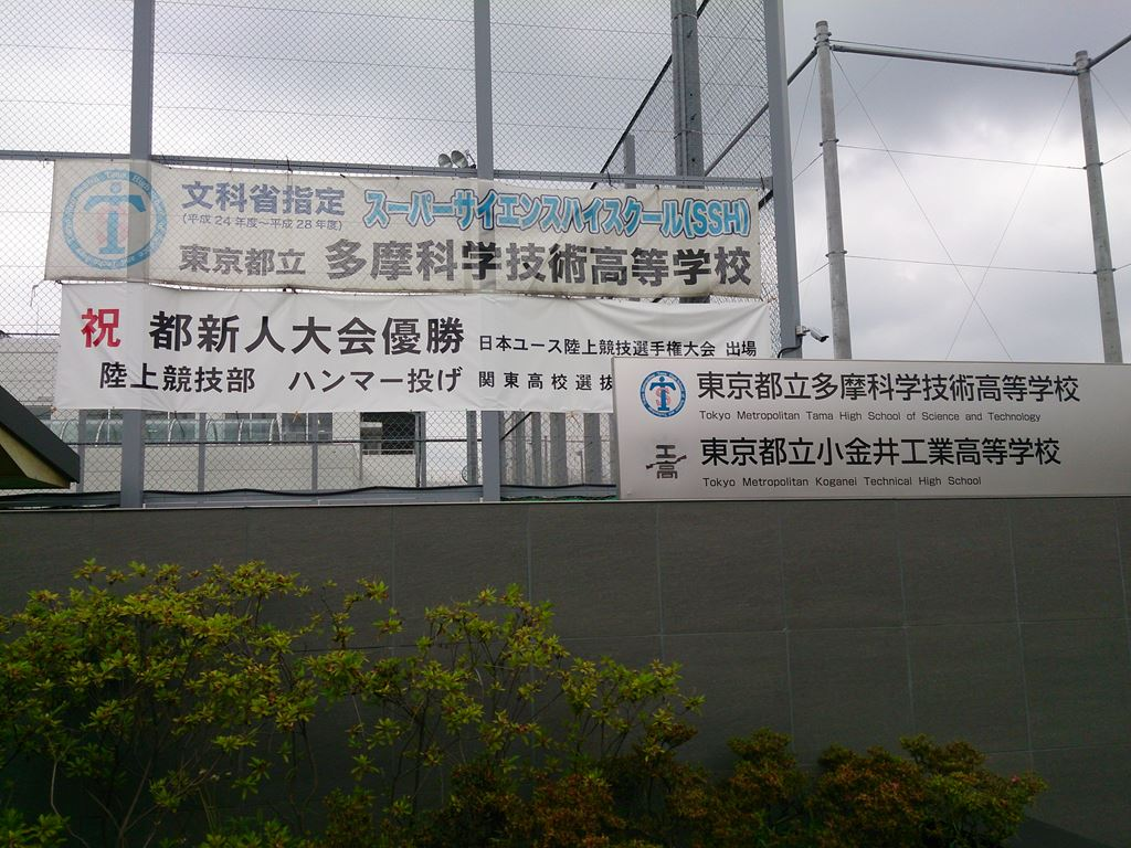 小金井工高